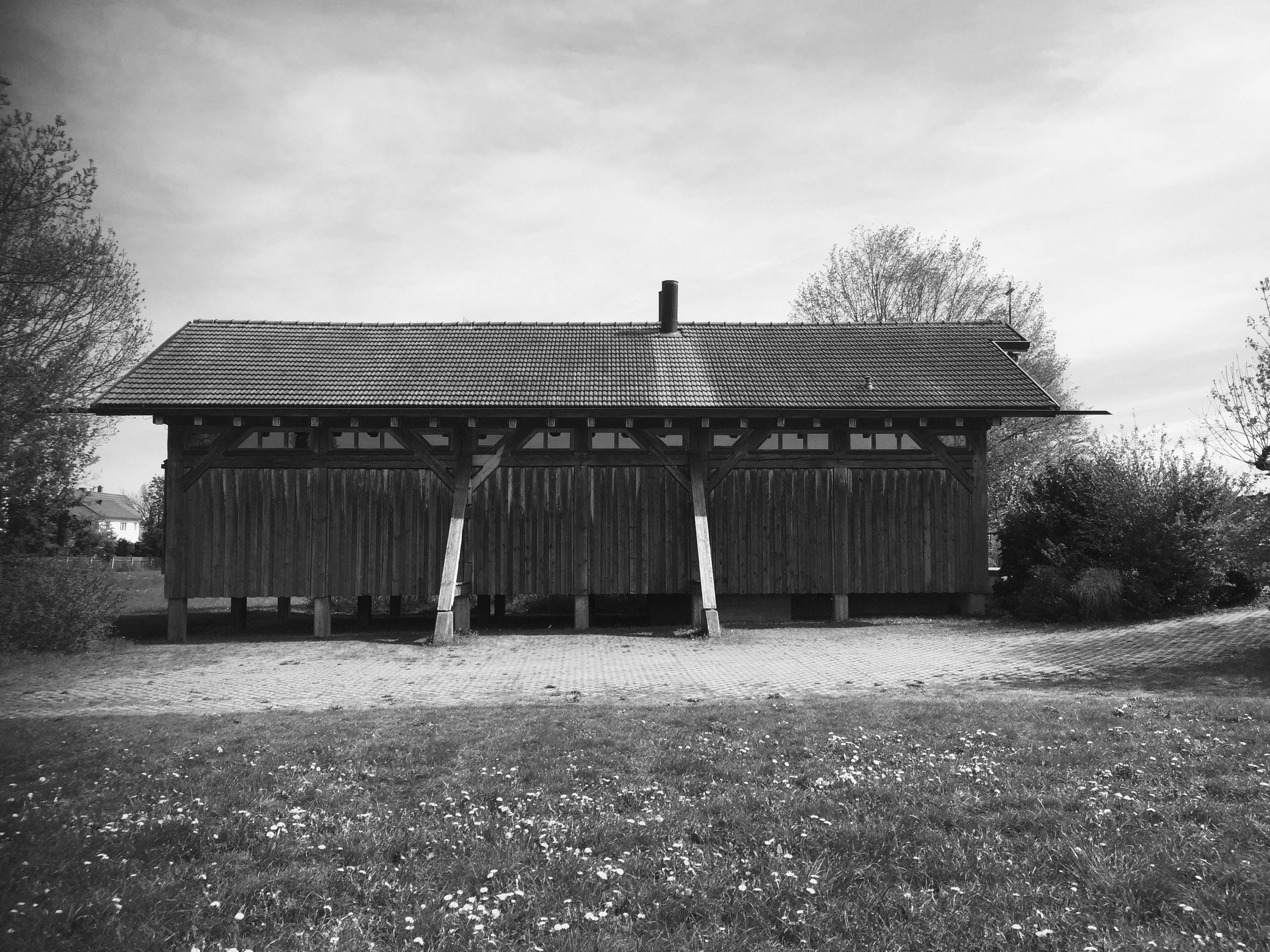 Küttinger